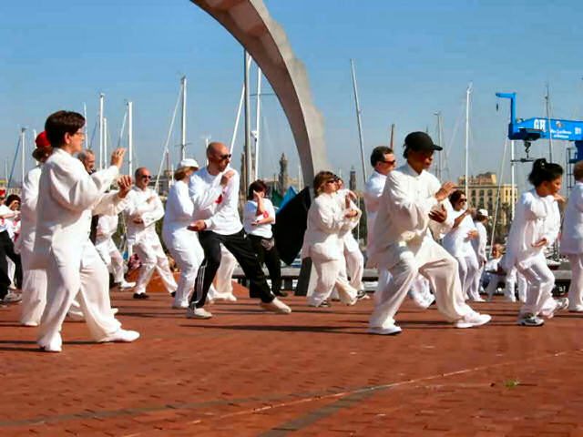 Fotografía de la Maratón de Tai Chi de Barcelona realizada por Enrique Flores y cedida al dominio público. En primer plano Dom Sales, inspirador y organizador de las Maratones de Tai Chi en Barcelona.